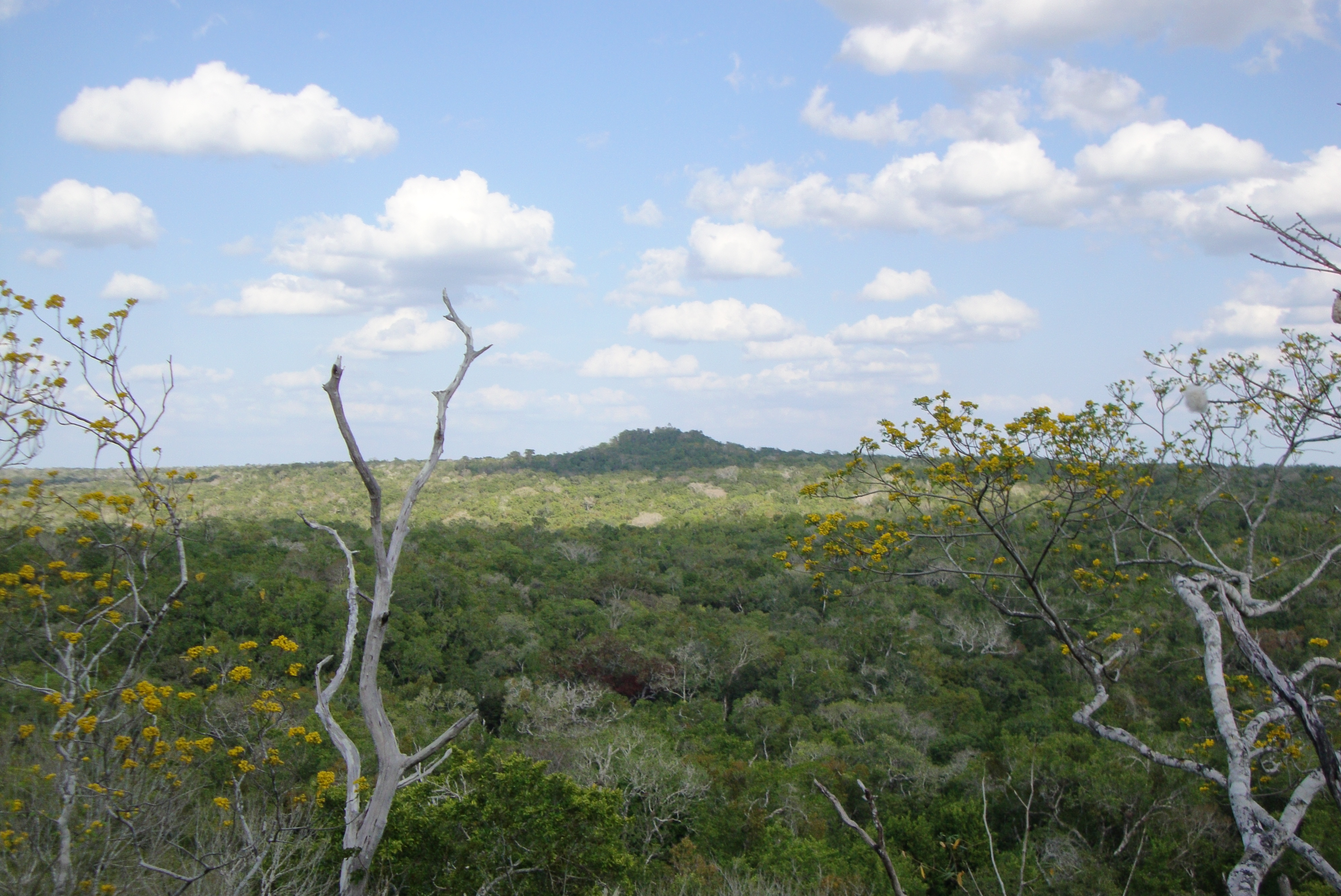 Foto del Complejo de La Danta (al fondo) en El Mirador, Petén, Guatemala.